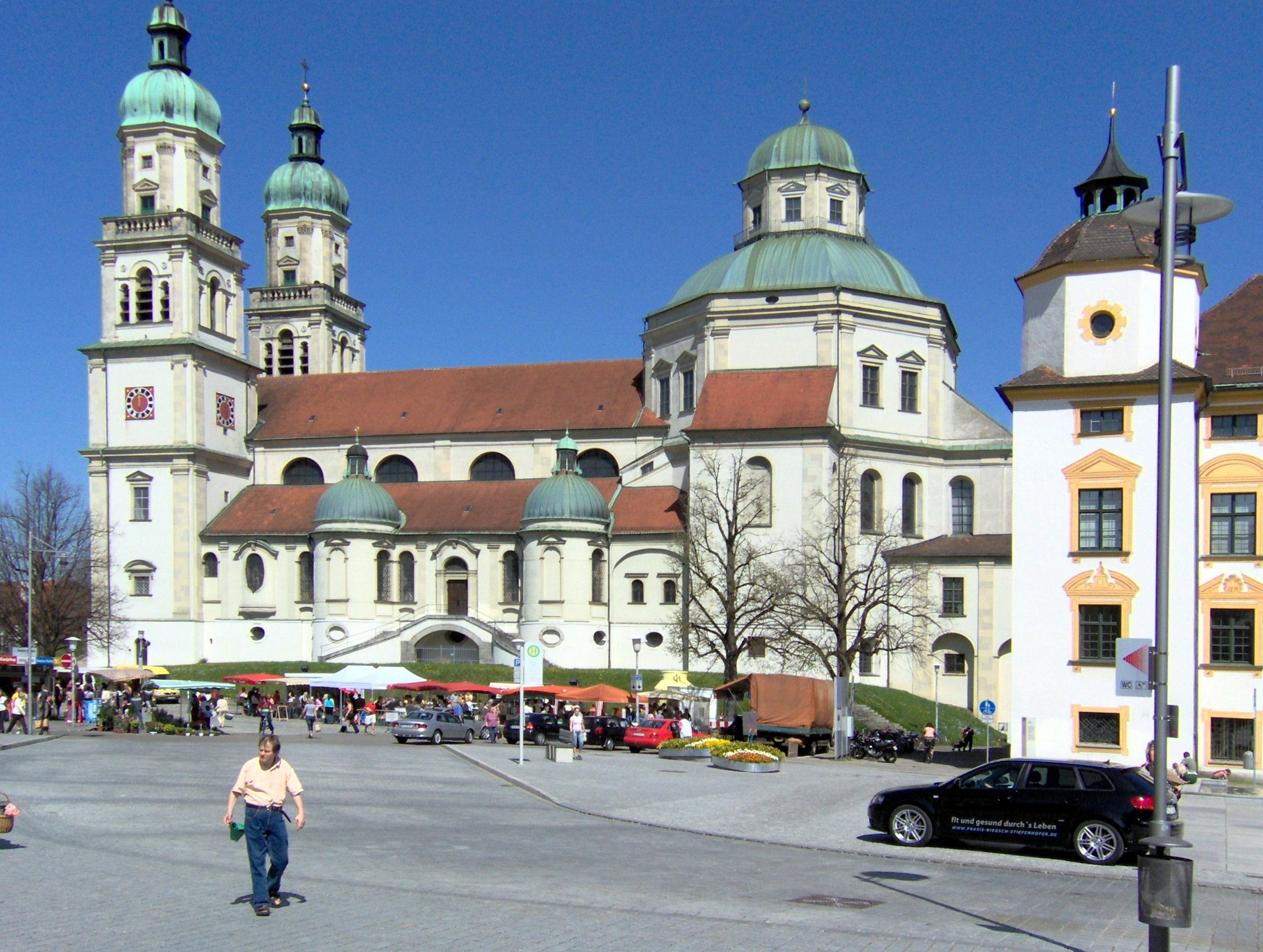 St. Lorenz Basilika in Kempten